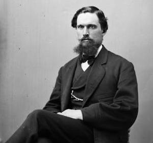 Rufus Stephenson, M.P., (Kent, Ont.)